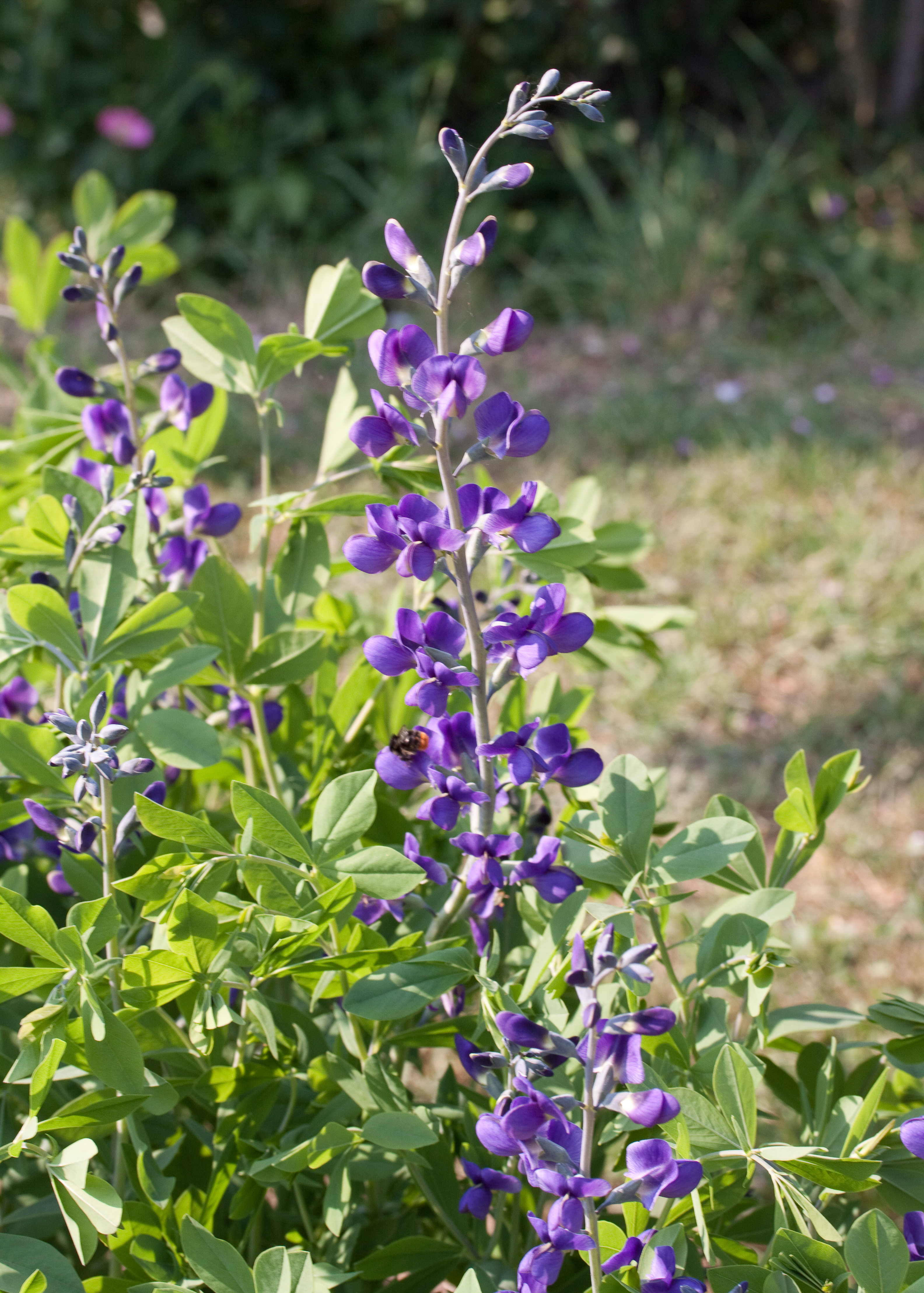 Fleurs de Baptisia australis - Jardin des Plantes - Paris